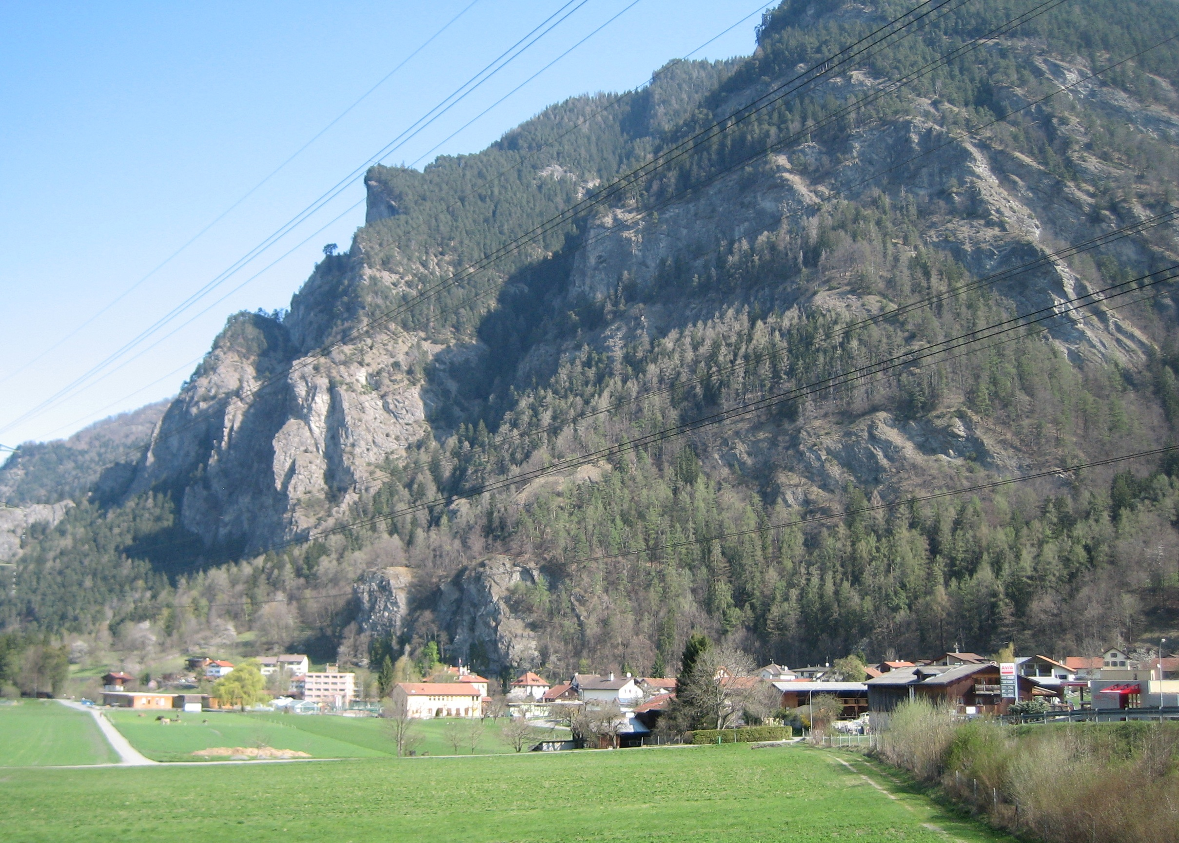 Rothenbrunnen